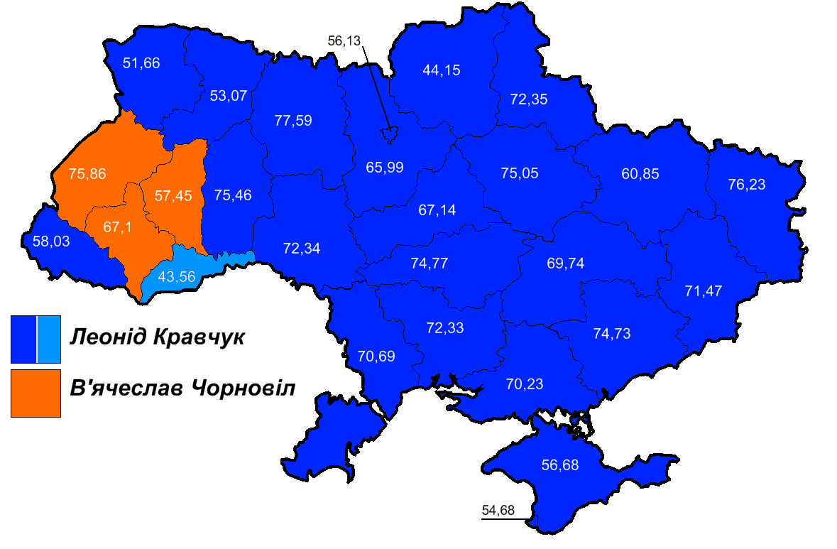 Вибори в Україні 1991. Україномовна версія